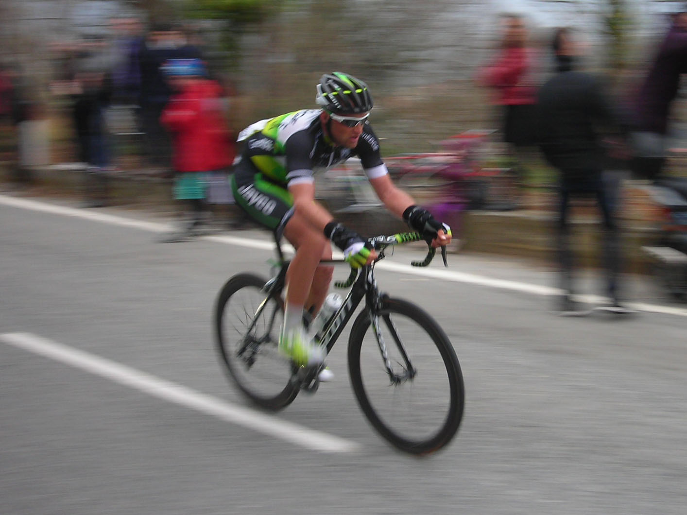 Tomas Vaitkus sulle Manie alla Milano-Sanremo 2012